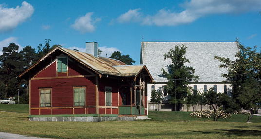 Lilla Ängby gård och Ängby kyrka i Bromma, foto 21 augusti 1966. Kvarteret BLEKINGEN, Kvarteret GUTEN, Holbergsgatan 4, Blackeberg, Bromma.